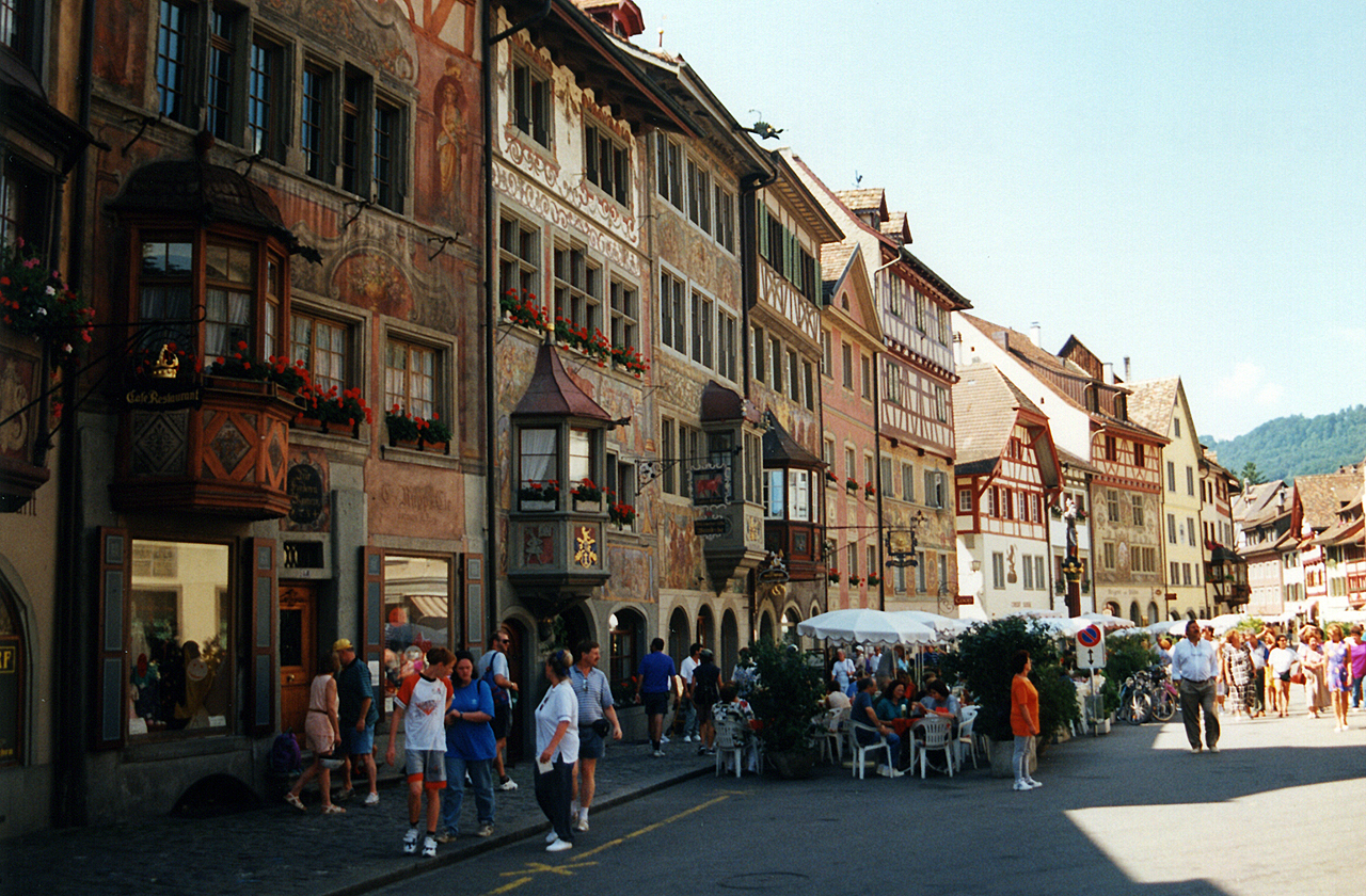 Stein am Rhein - Häuser am Rathausplatz, 1997 Camera data Camera: Praktica BMS Lens: Prakticar MC Auto Zoom 35-70mm 1:3.5-4.5